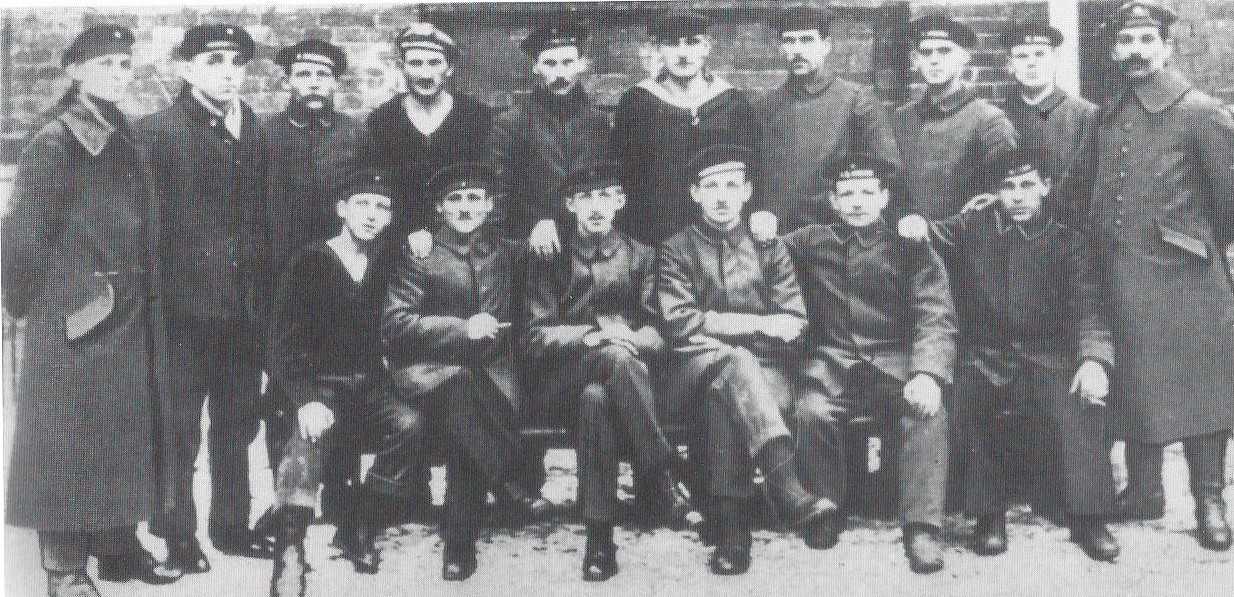 „Angehörige der von Karl Meseberg (sitzend, Dritter von rechts) kommandierten Matrosenkompanie. Die ohne Zustimmung des Soldatenrates gebildete Kompanie trug in den ersten Monaten des Jahres 1919 entscheidend zur Eskalation des Konflikts zwischen alter und neuer Ordnung in der Stadt Halle bei.“ (Hans-Werner Schmuhl)